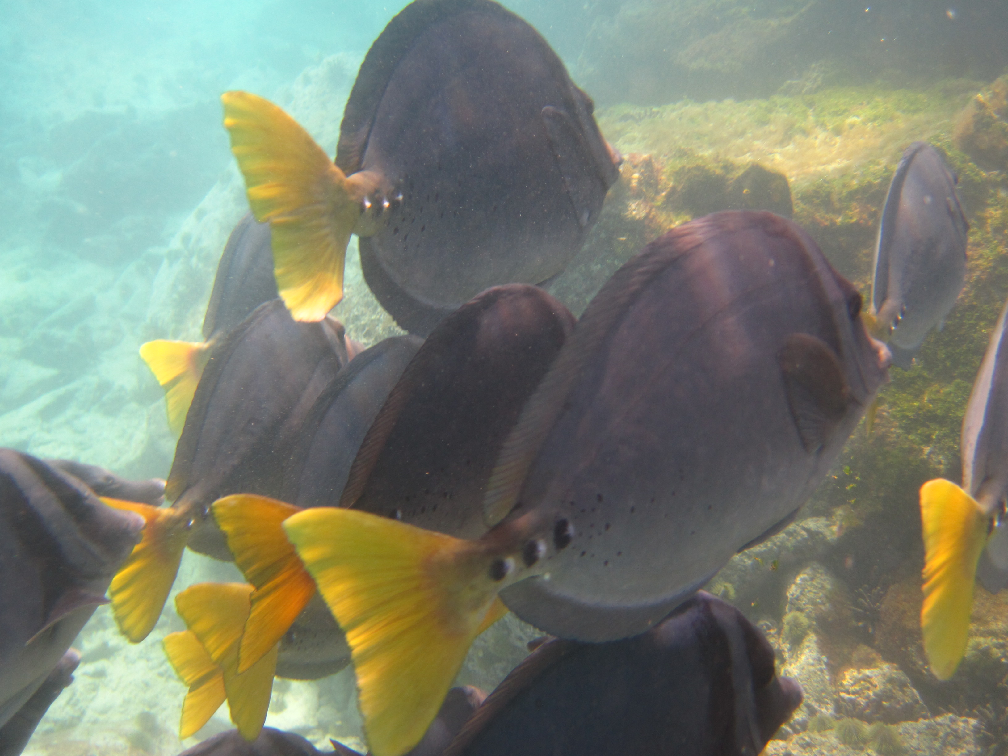 Prionurus laticlavius en Galápagos, Ecuador